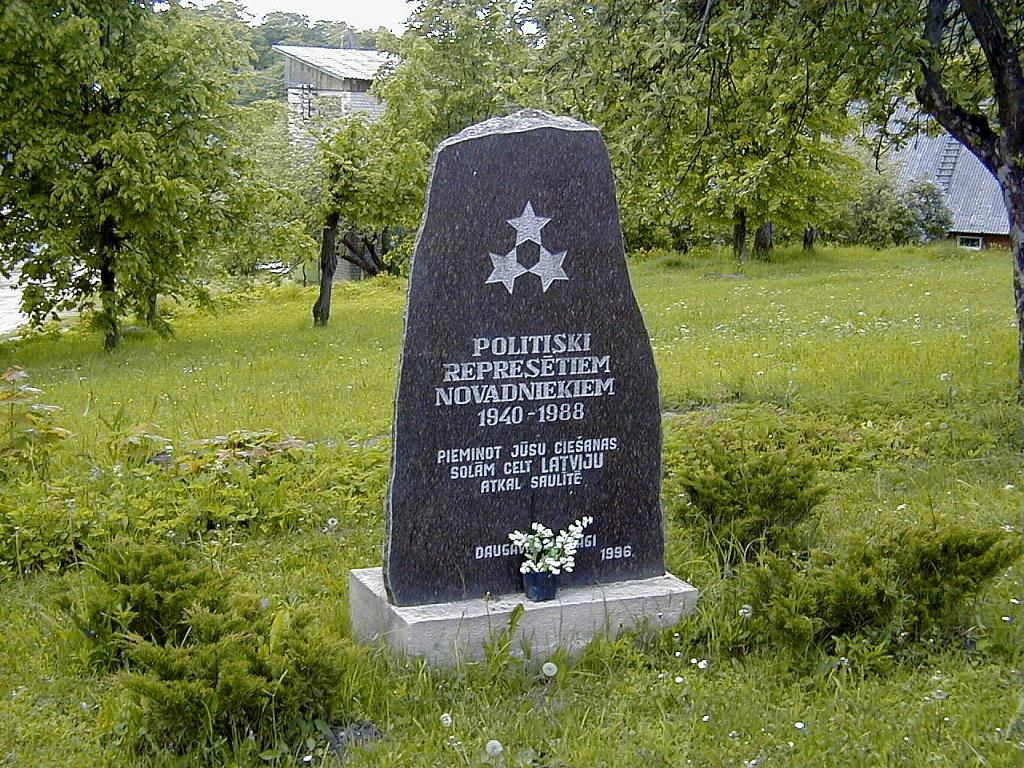 Ērgļi, piemineklis represētajiem 2001-06-02